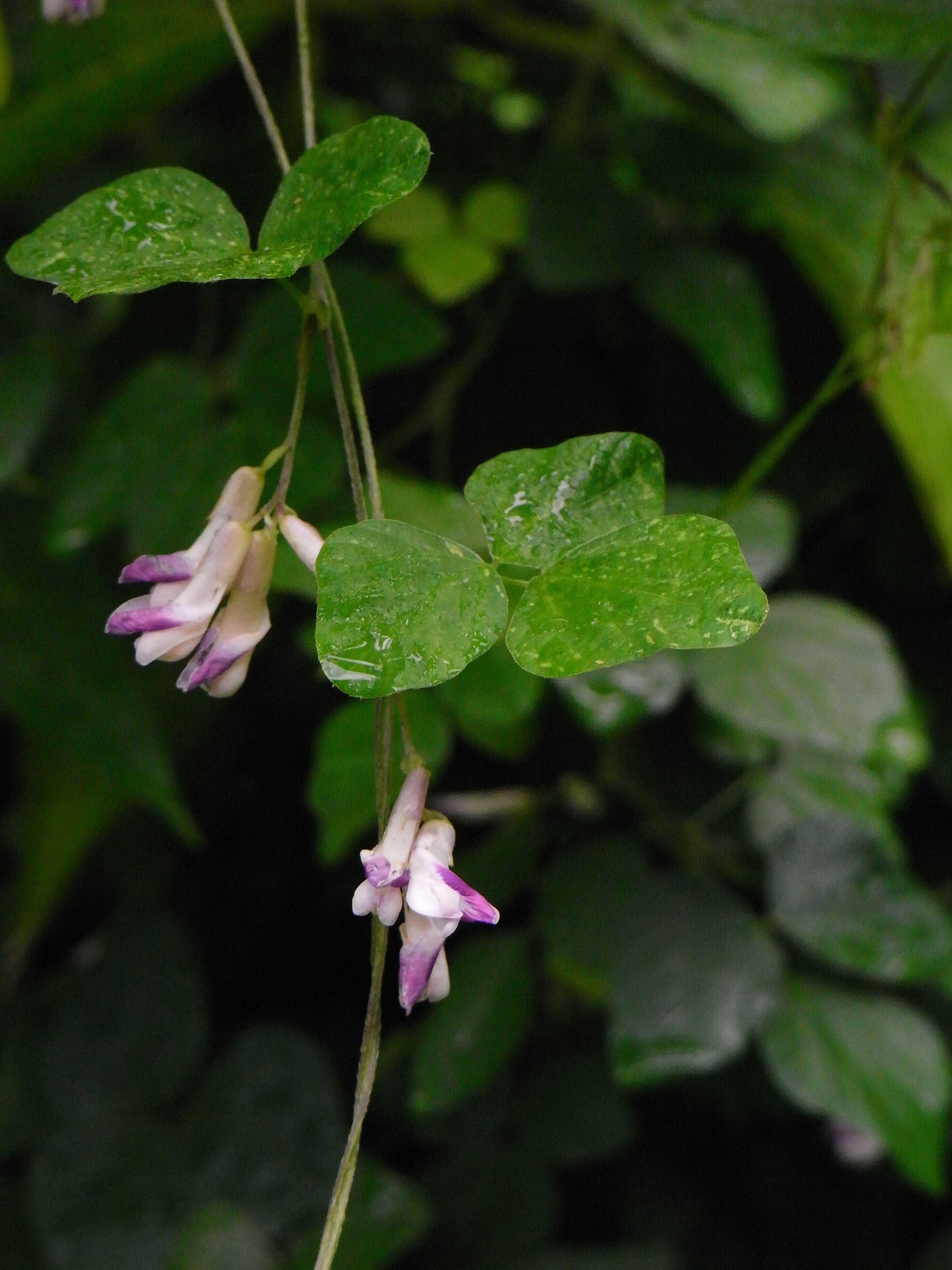 ヤブマメ / Amphicarpaea edgeworthii 同じマメ科のクズに似るが、ヤブマメの葉は小型。地上部の開放化と閉鎖花、地下の閉鎖花と三種の花を咲かせる。地下で結実した果実をアイヌ民族はアハと呼び食用にした。